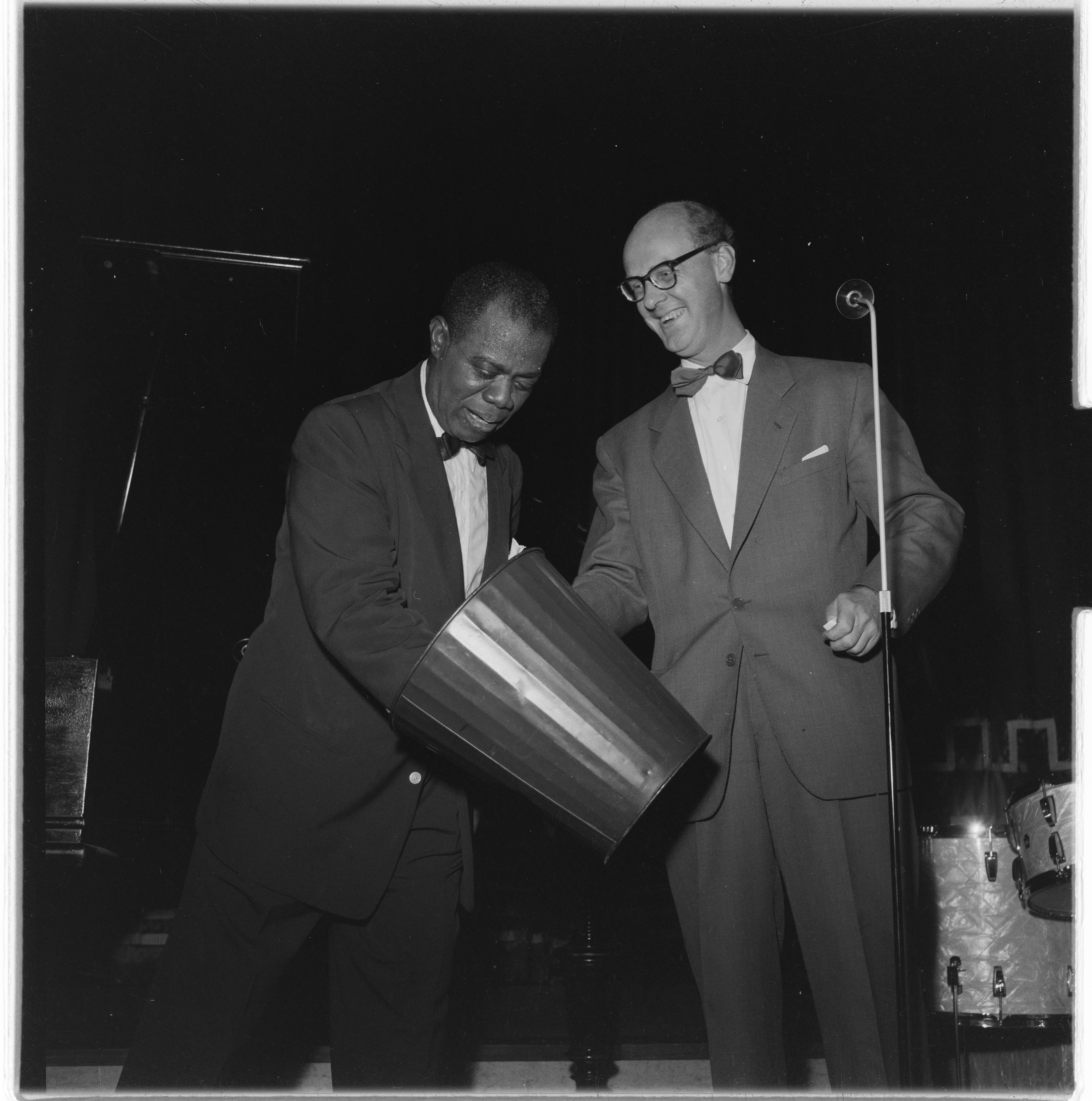 Bildet er hentet fra Arkivverket. Louis Armstrong til Oslo og konserter. NÅ nr. 42, 1955. Arkivinstitusjon : Riksarkivet Arkivnavn : Billedbladet NÅ Sted : Norge, Oslo, Oslo, Emneord: Jazz, Konsert, Musikk Avbildet: Armstrong, Louis